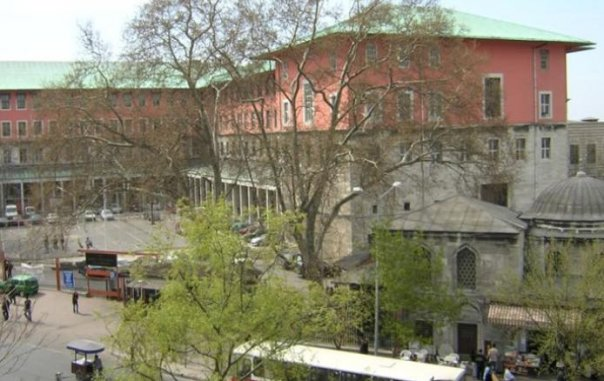 İstanbul Üniversitesi Fen Fakültesi